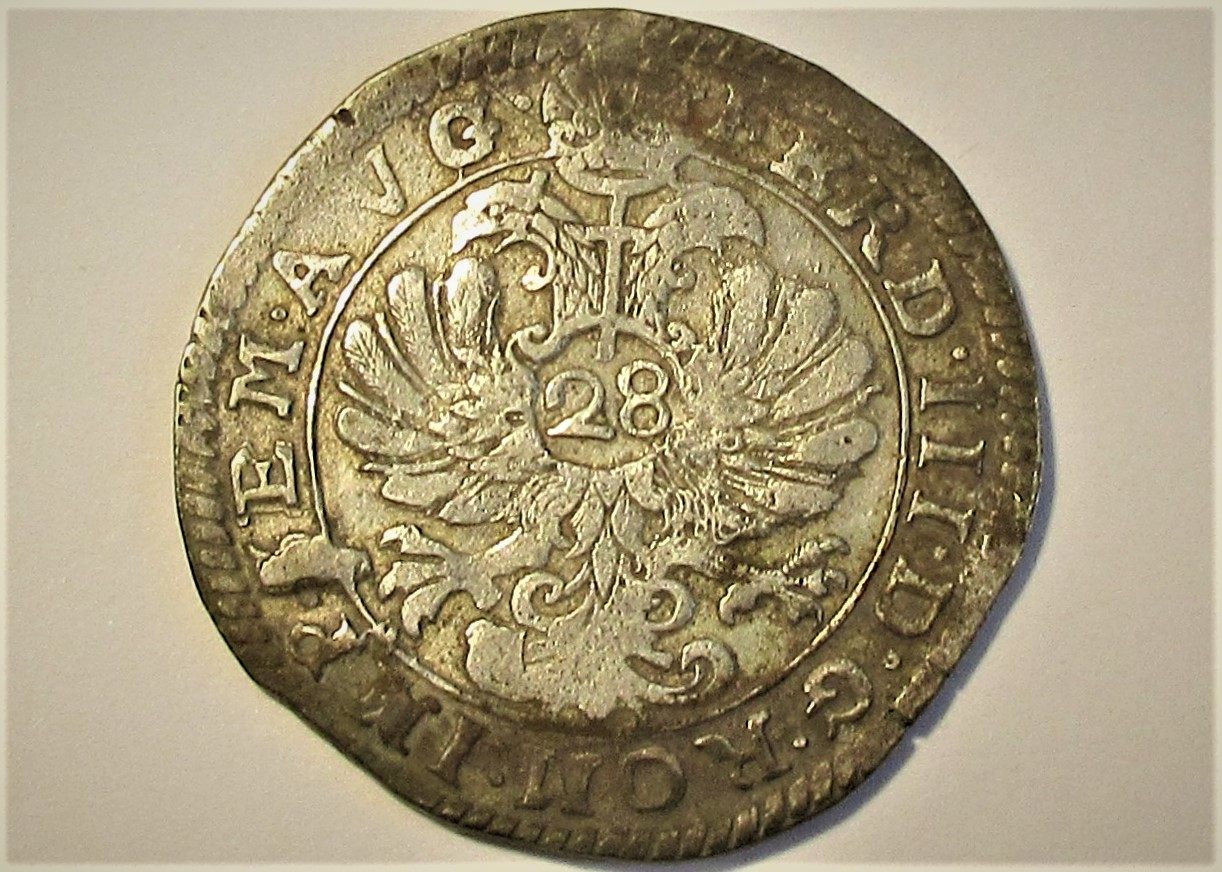 Oldenburger Silbergulden (28 Stüber), um 1640, Kalvelage 175a